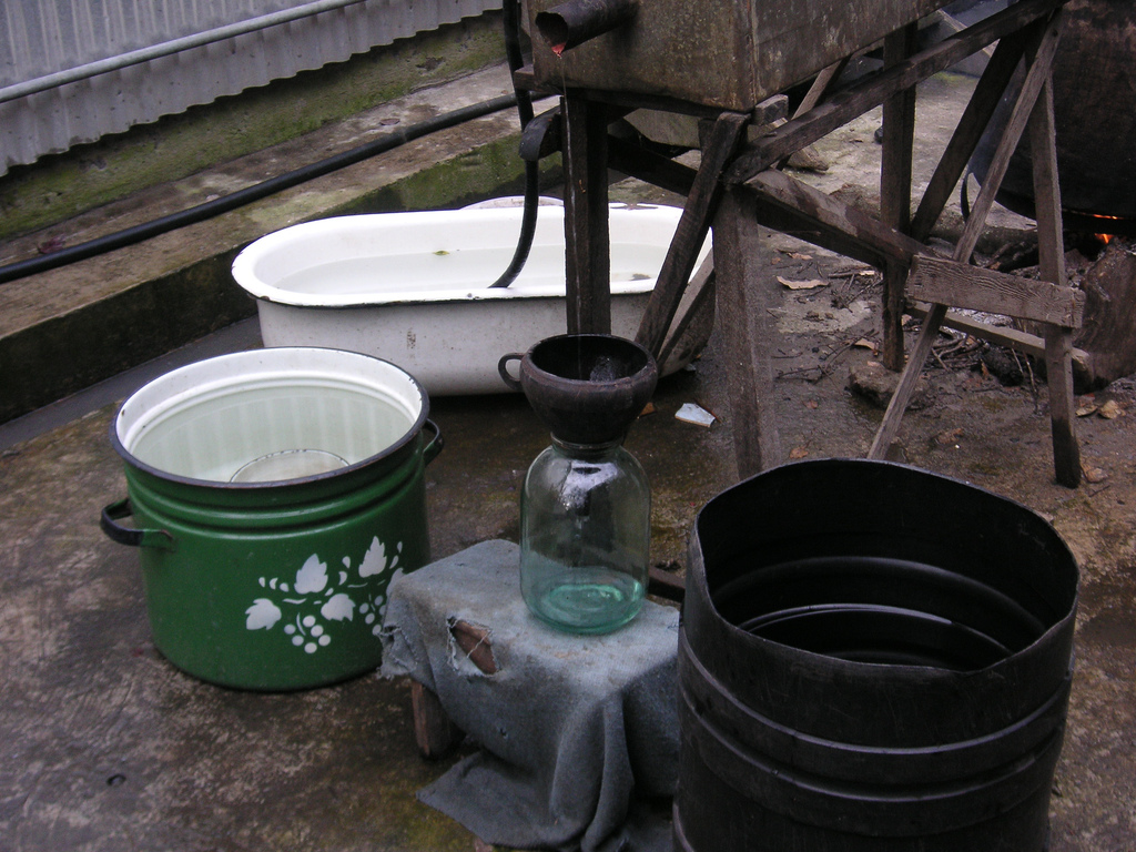 Making Chacha